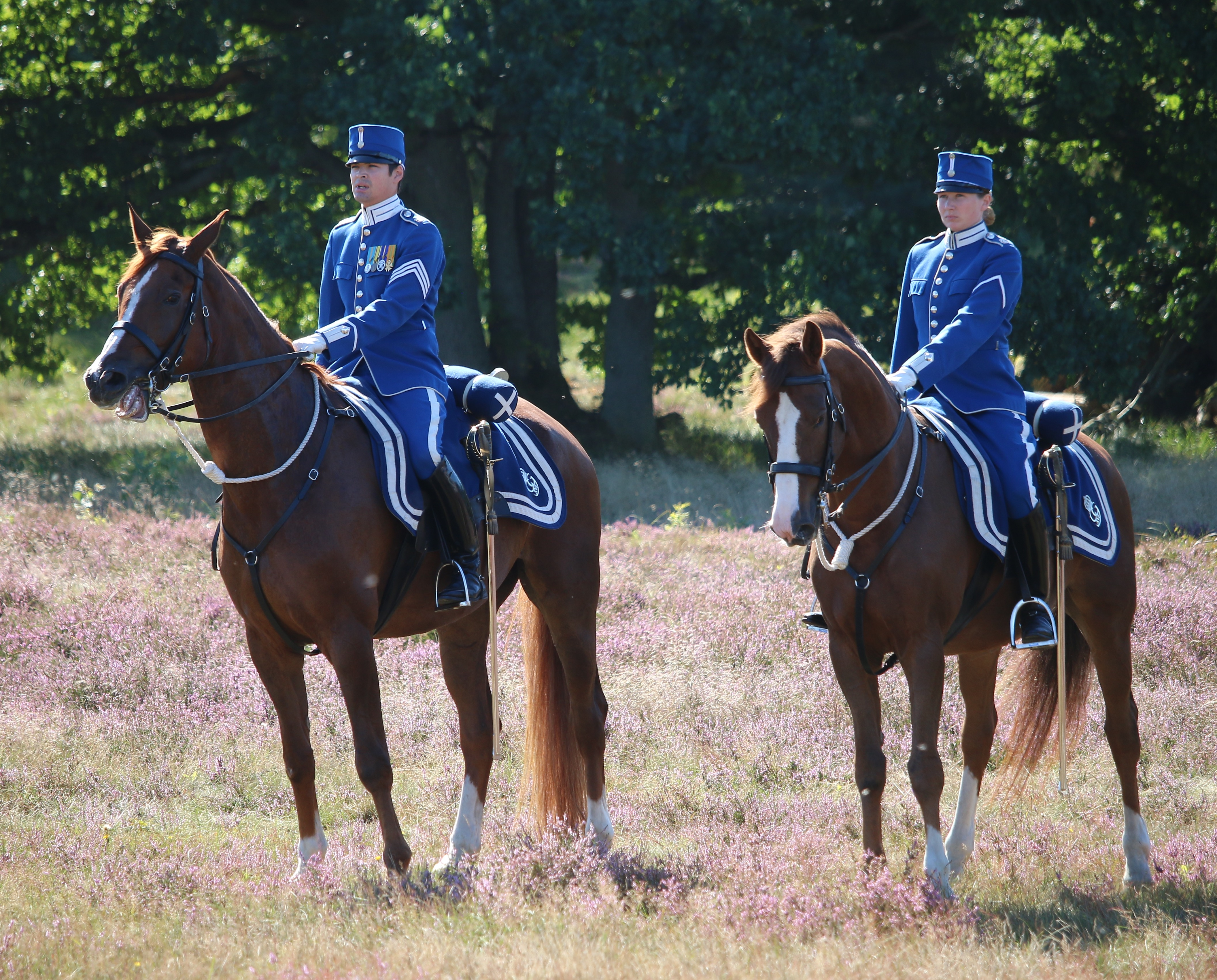 Beridna soldater Revinge 2016